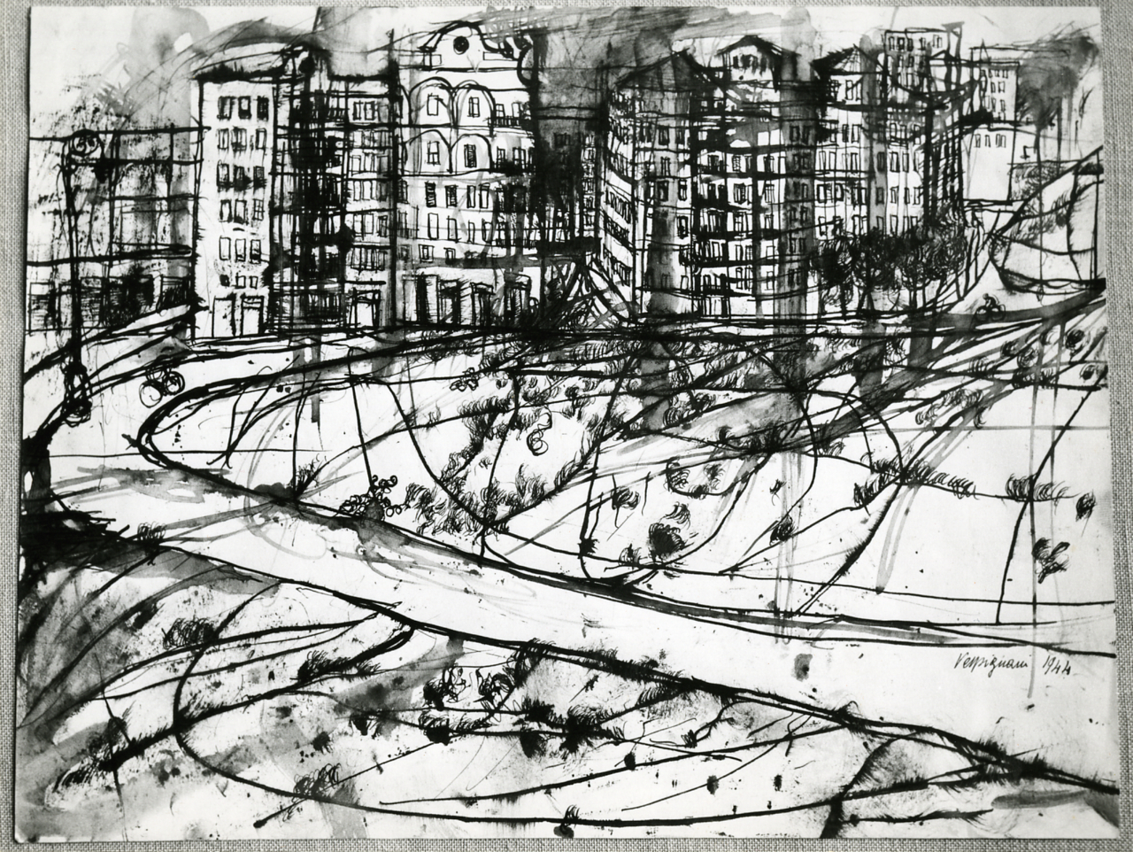 Servizio fotografico : Italia, 1970 / Paolo Monti. - Stampe: 7 : Positivo b/n, gelatina bromuro d'argento/ carta, 18x24. - ((Sul coperchio della scatola iscrizione didascalica manoscritta a pennarello nero: "Milano-10/ Metropolitana".